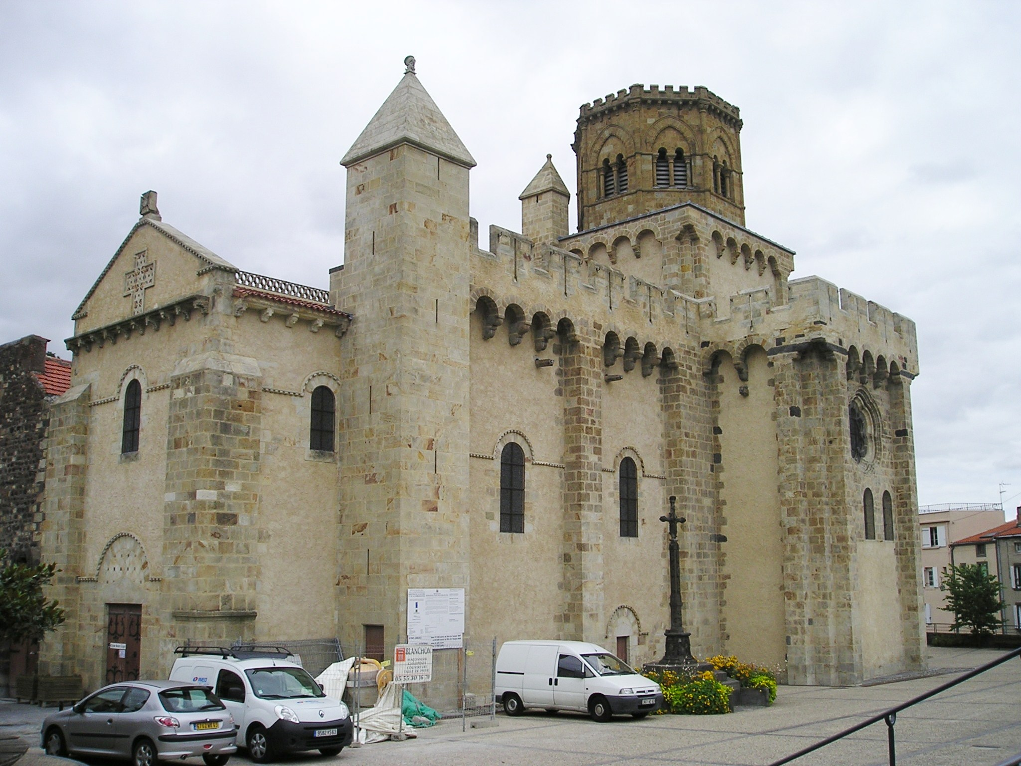 Eglise St-Léger in Royat